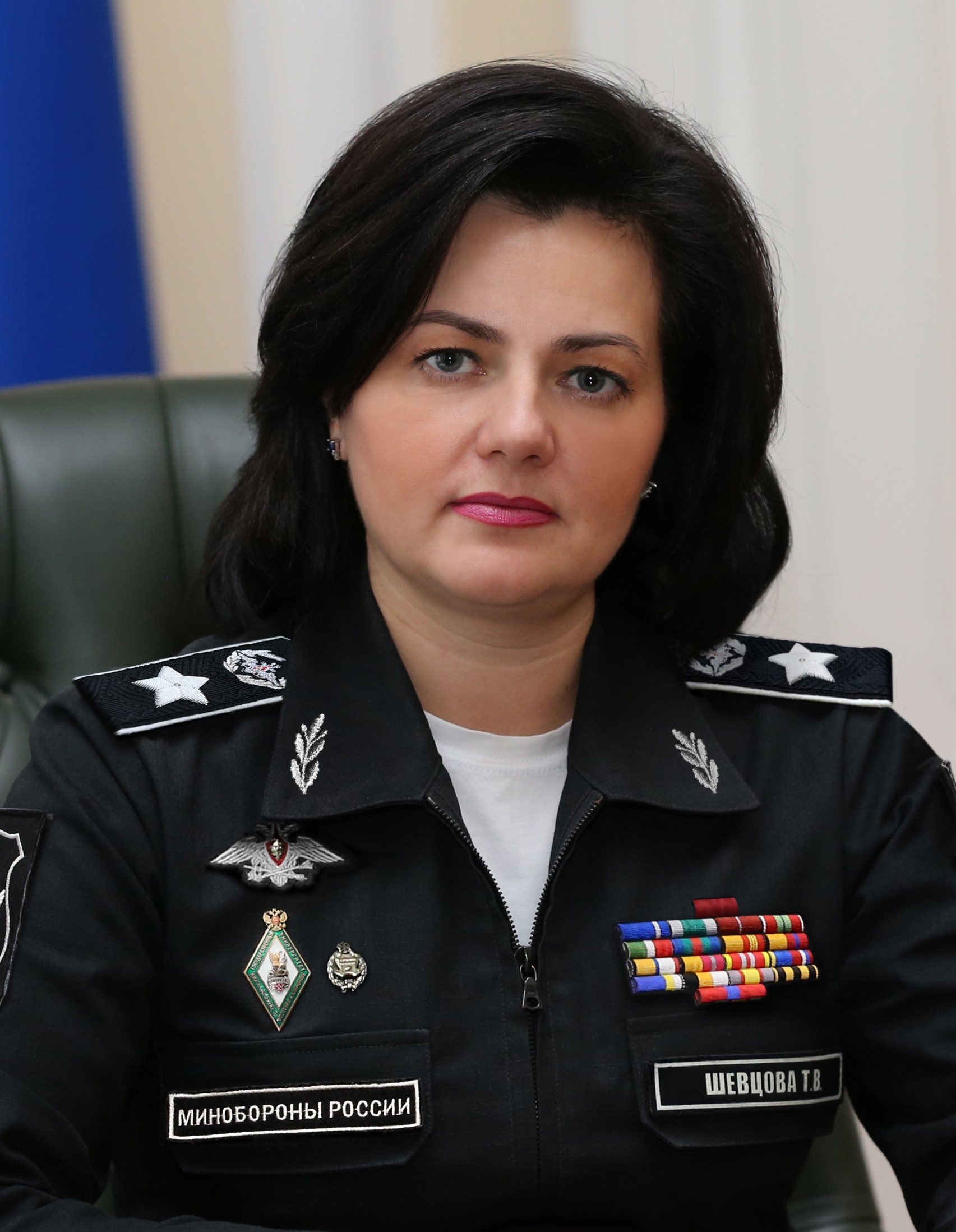 Заместитель Министра обороны Российской Федерации Татьяна Викторовна Шевцова